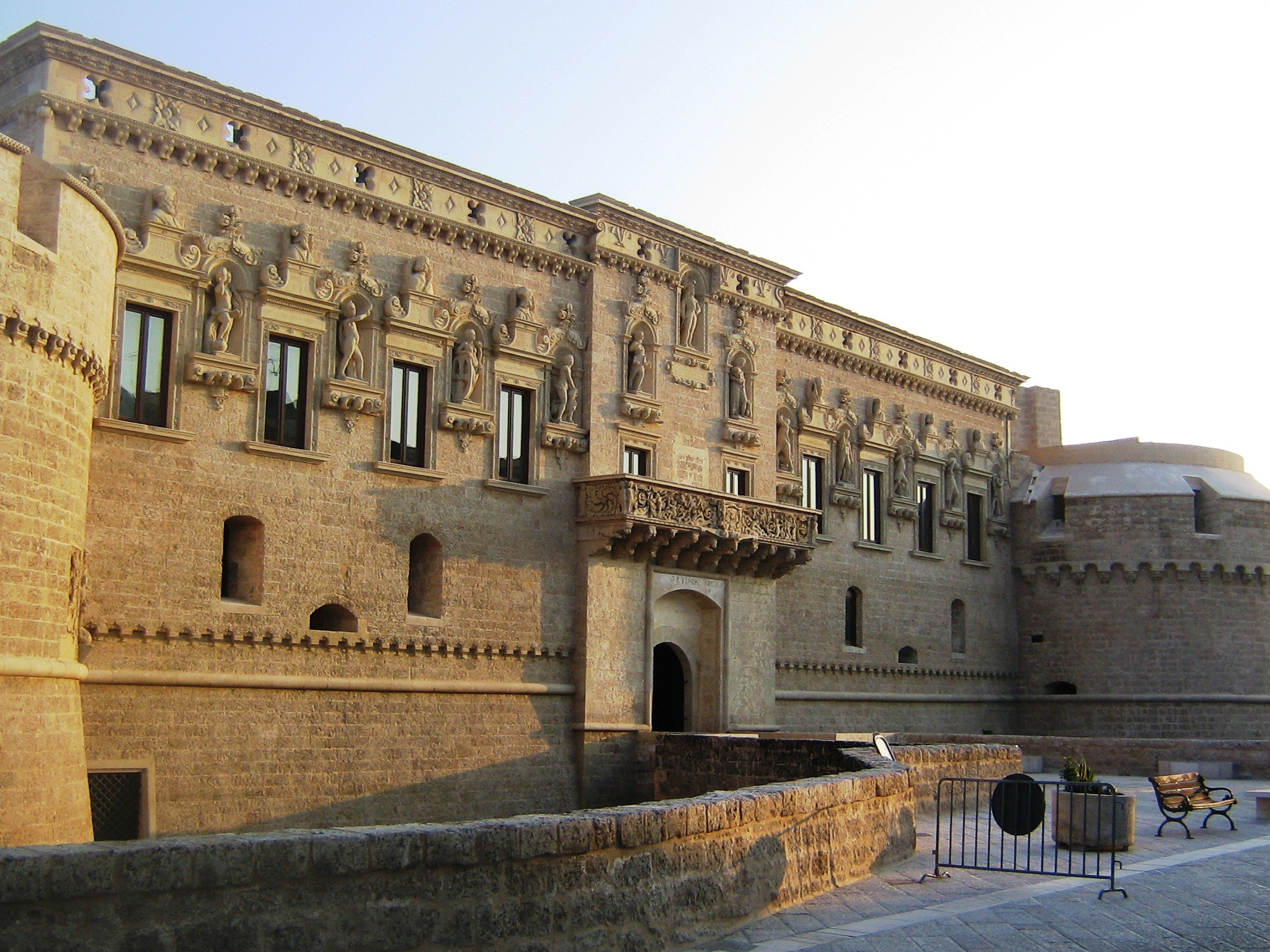 Castello de' Monti Corigliano d'Otranto